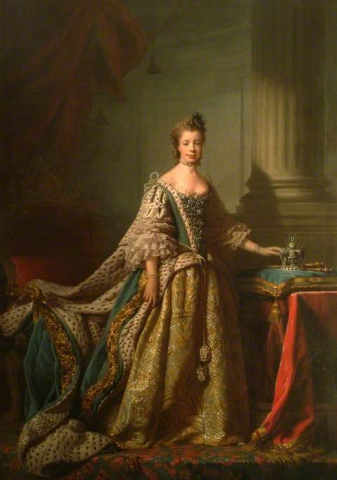 Portrait of Charlotte of Mecklenburg-Strelitz (1744-1818)